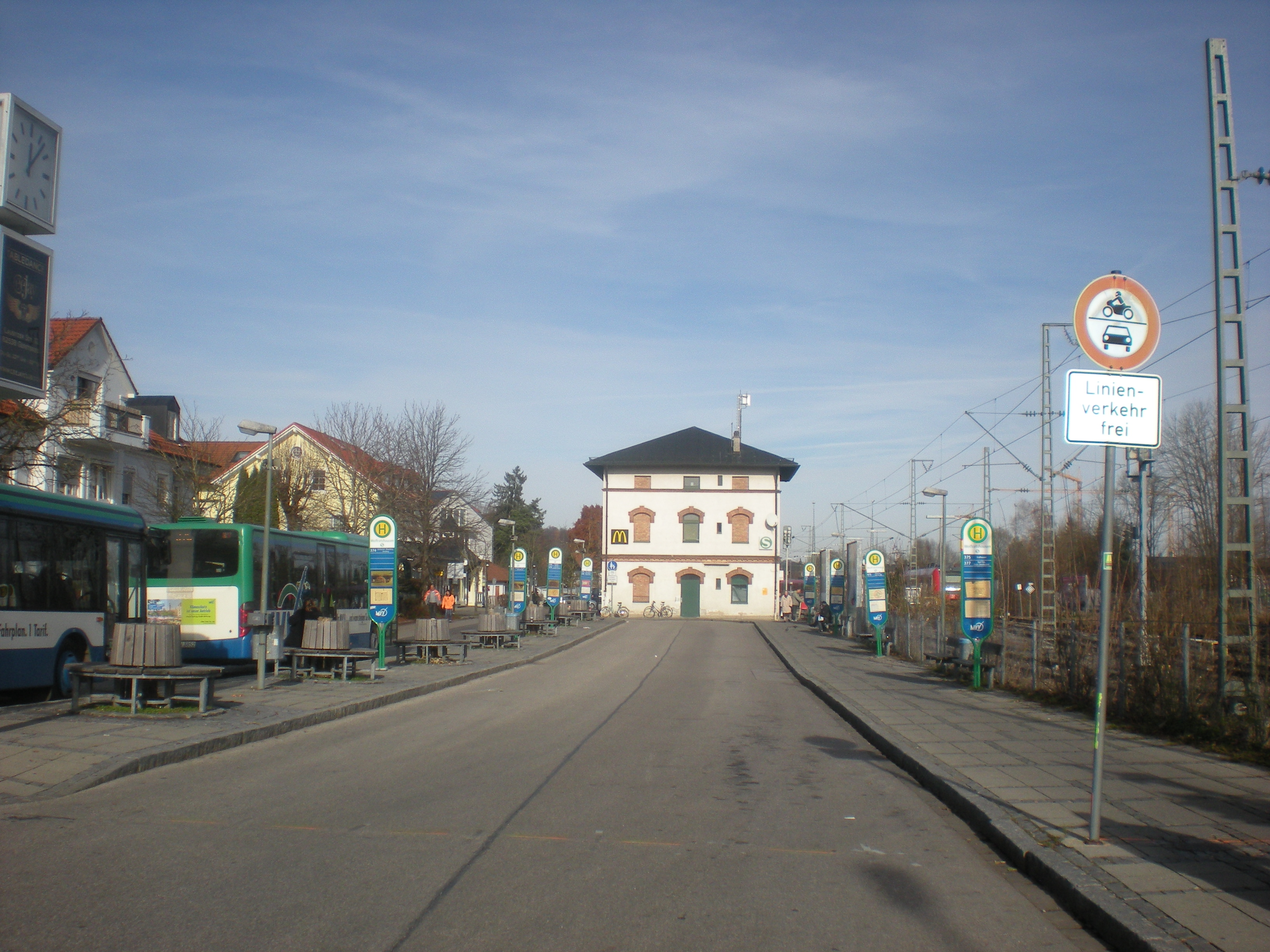 Busbahnhof des Bahnhofs Wolfratshausen, im Hintergrund das Wolfratshausener Empfangsgebäude